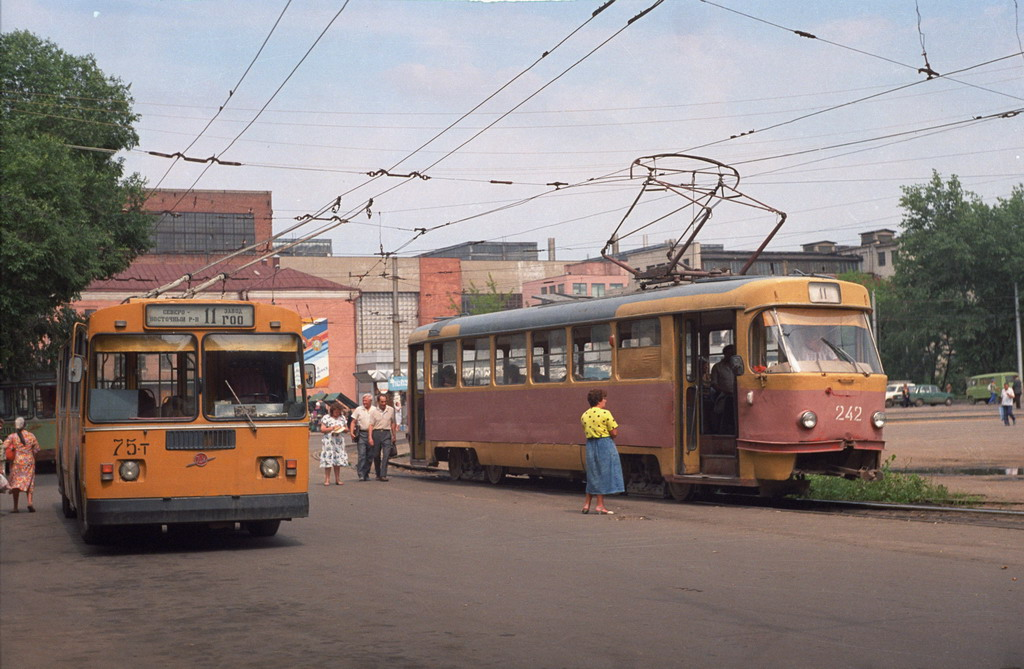 Воронежский троллейбус в 1993 году